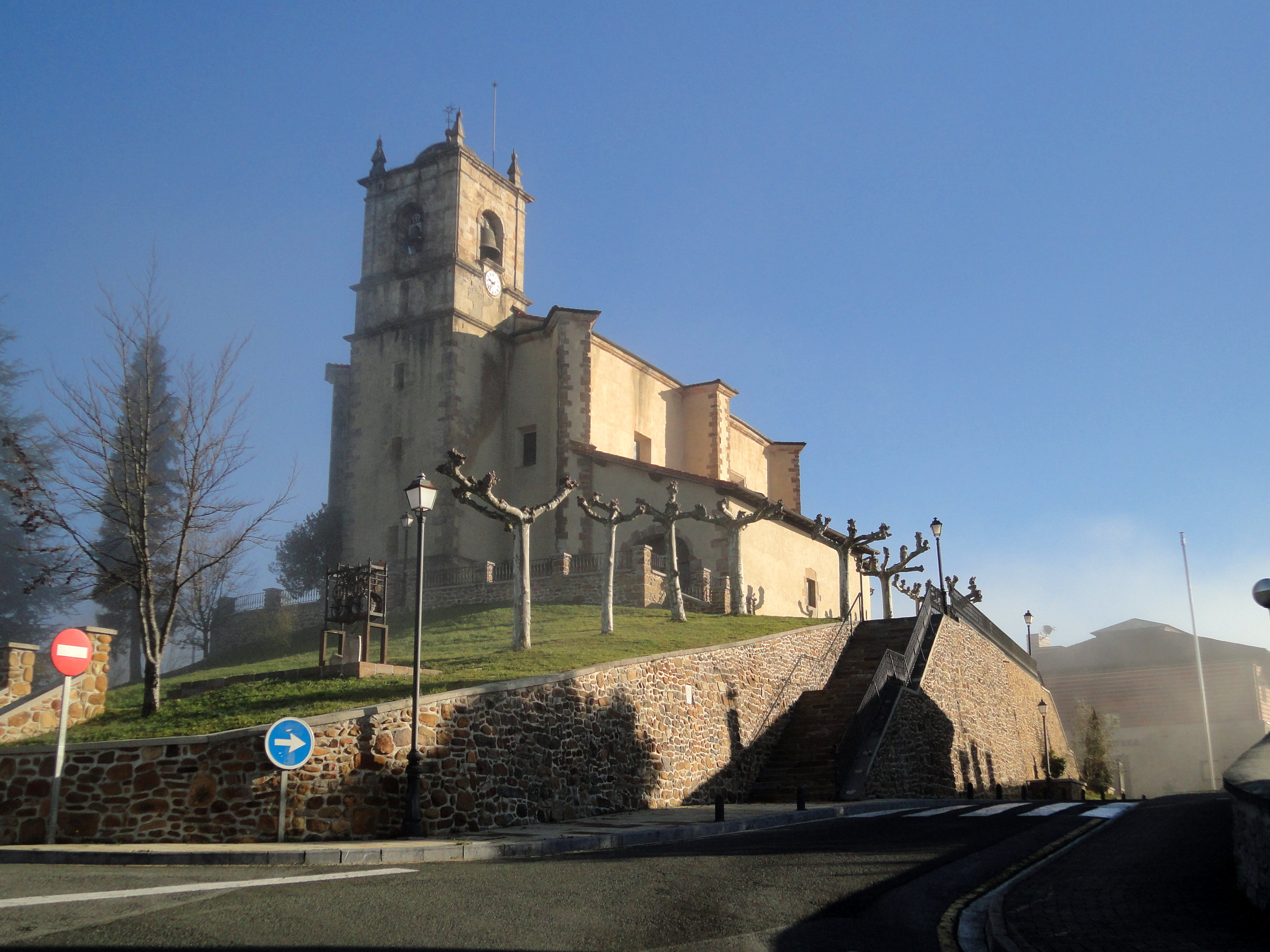 San Juan Bataiatzailea eliza - Olaberria